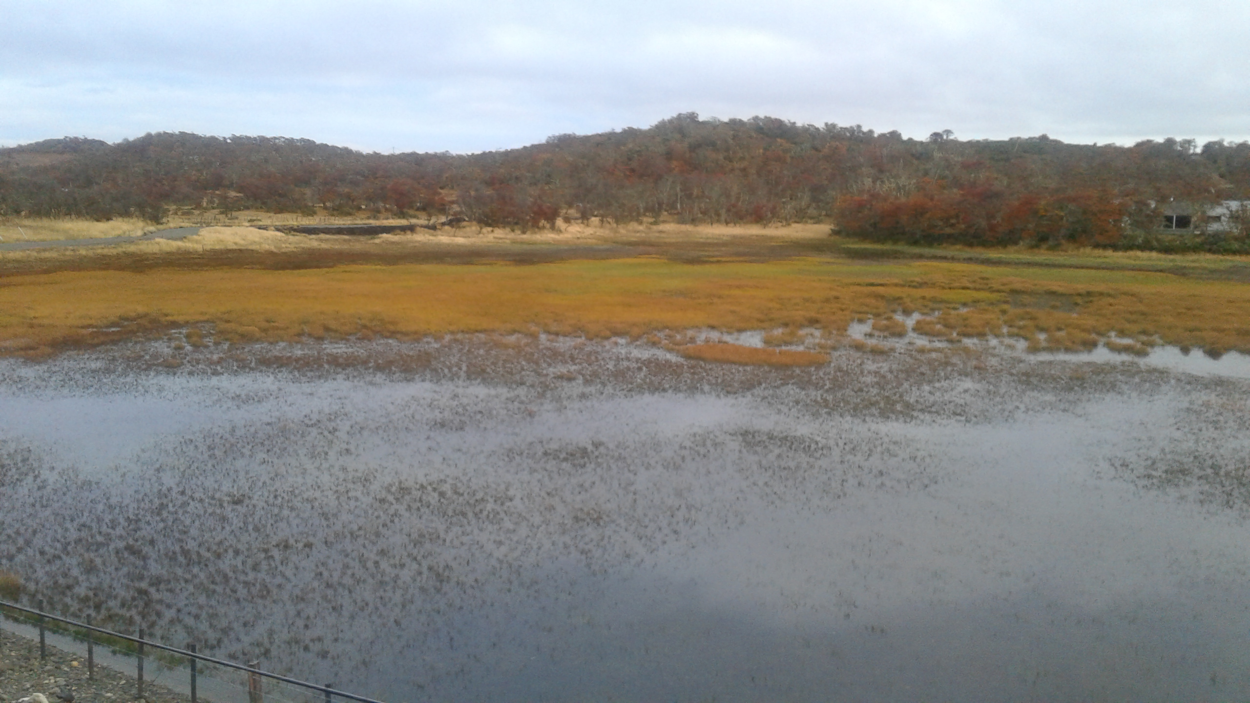 Pradera en la zona de la Patagonia chilena.